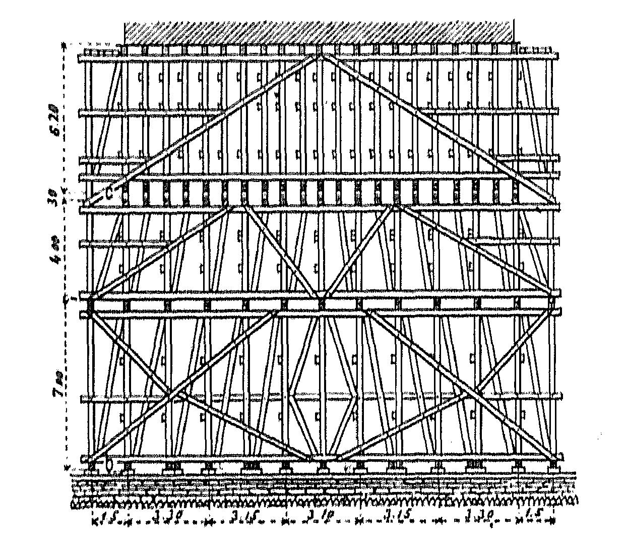 Viaduc du Syratal – Plauen – Allemagne – Montage du cintre.